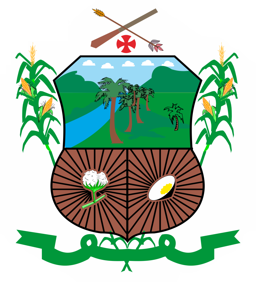 Brasão de Parelhas, Rio Grande do Norte, Brasil.